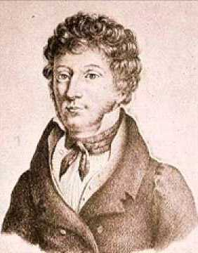 австрійський музикант французького походження